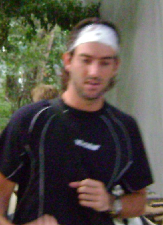 Tenista brasileiro Franco Ferreiro, no Aberto de São Paulo de Tênis.